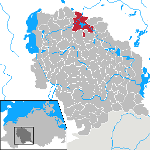 Sternberg in Mecklenburg-Vorpommern - District Parchim